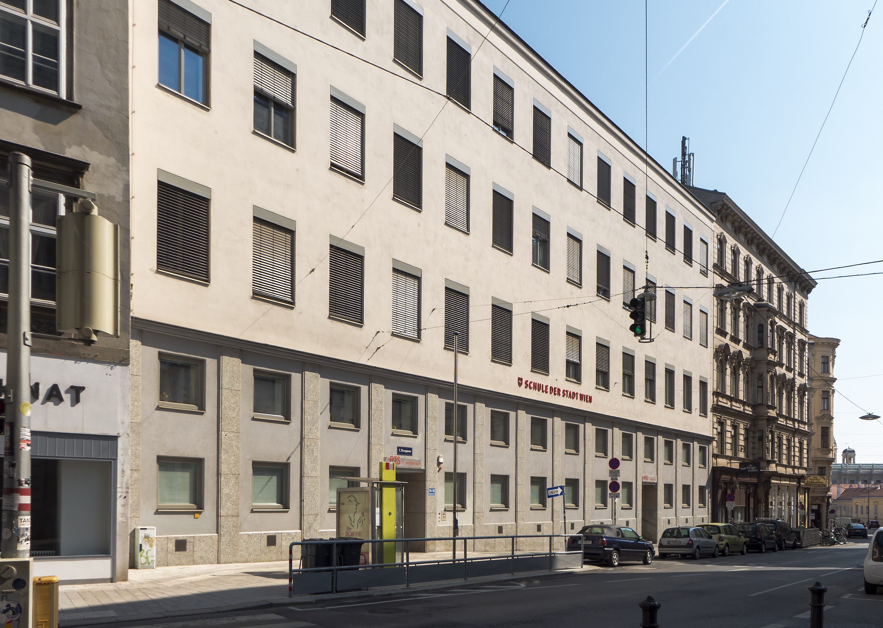 Polytechnische Schule im Zentrum in Wien 7